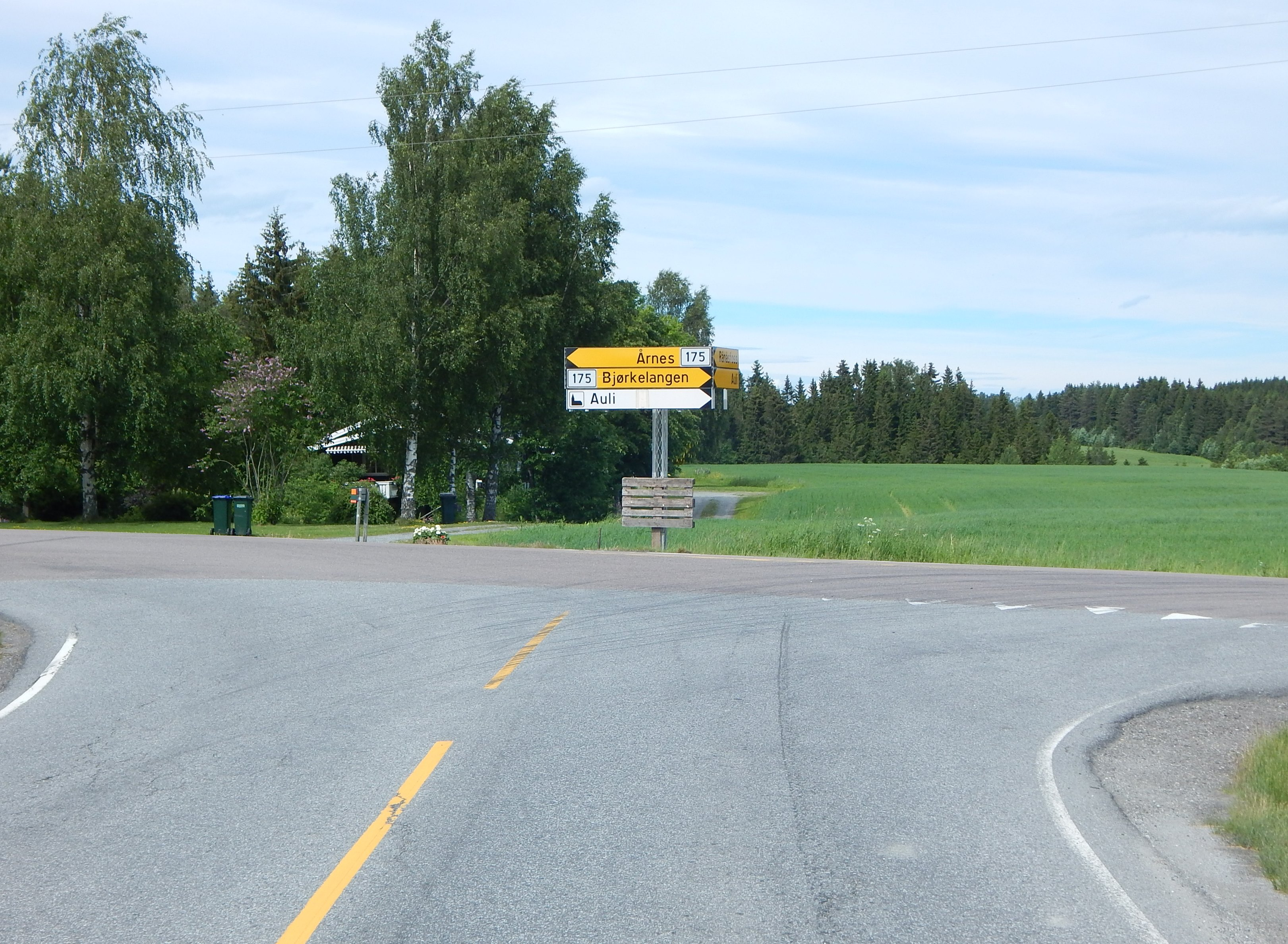 Hagavegen (fylkesvei 175) i krysset ved Aulivegen (fylkesvei 476), like ved Betelkirken)